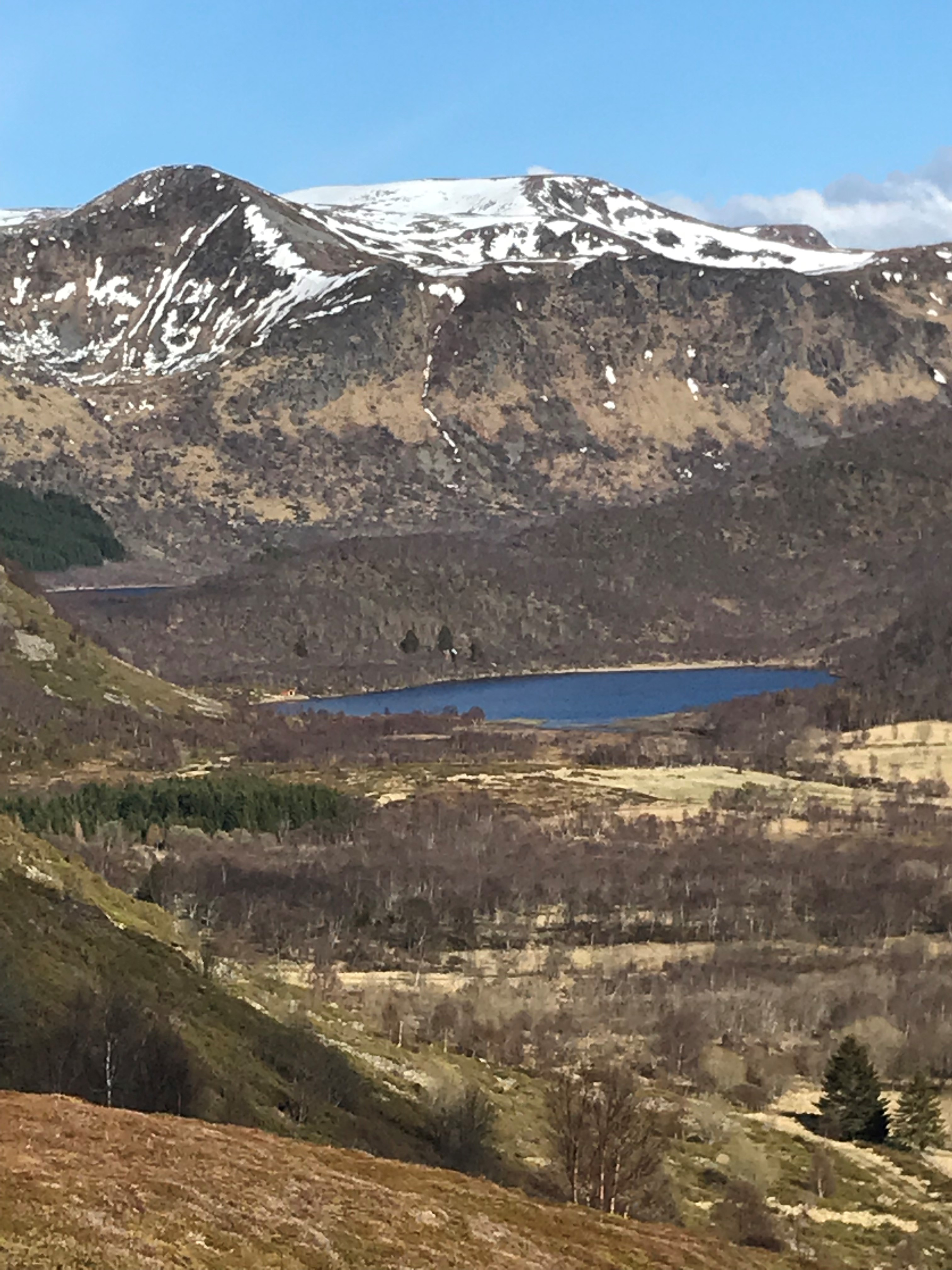 Vikdalenmedvikvatnan